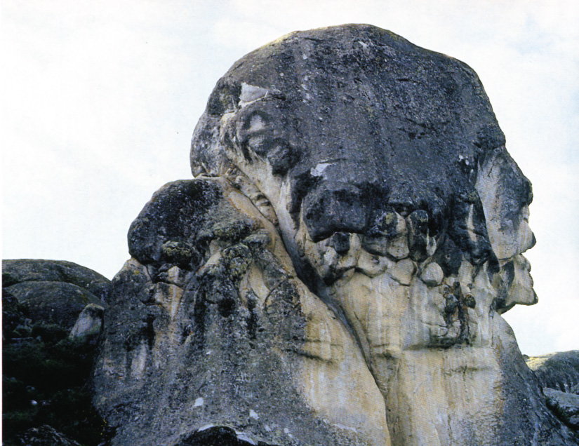 Piedra con forma de cabeza humana modelada por el viento en Marcahuasi. Licensing Fotografía tomada por Ari, licenciada bajo GFDL. --Ari 00:36 15 feb 2006 (CET)